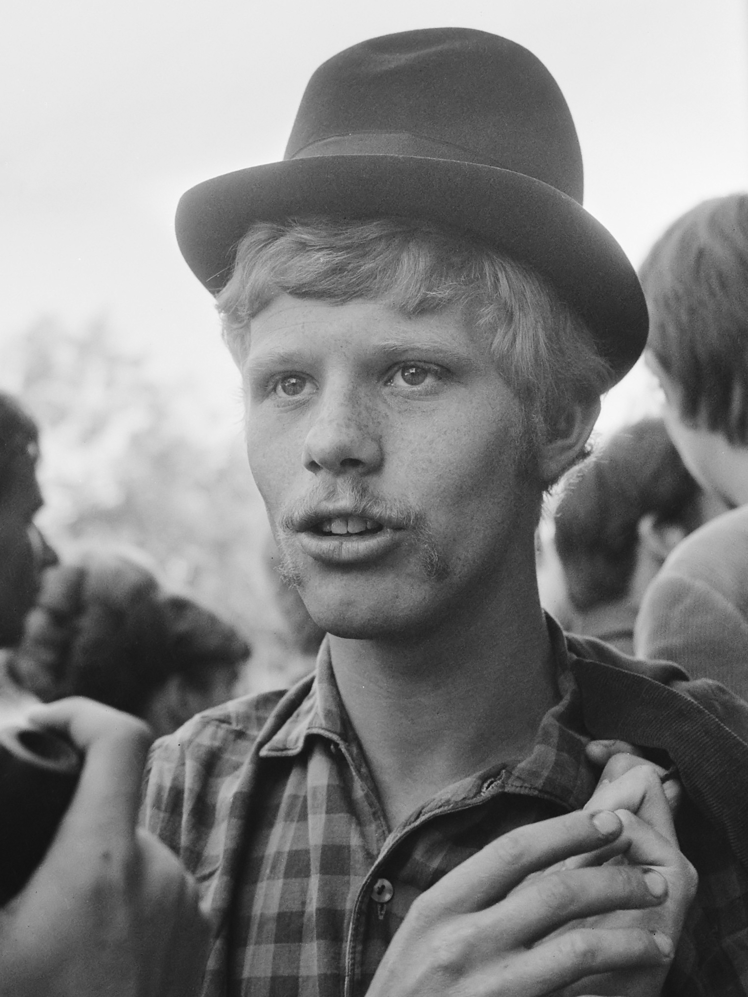 Provo's bij de hoofdcommissaris. Rob Stolk met bolhoed 14 augustus 1965